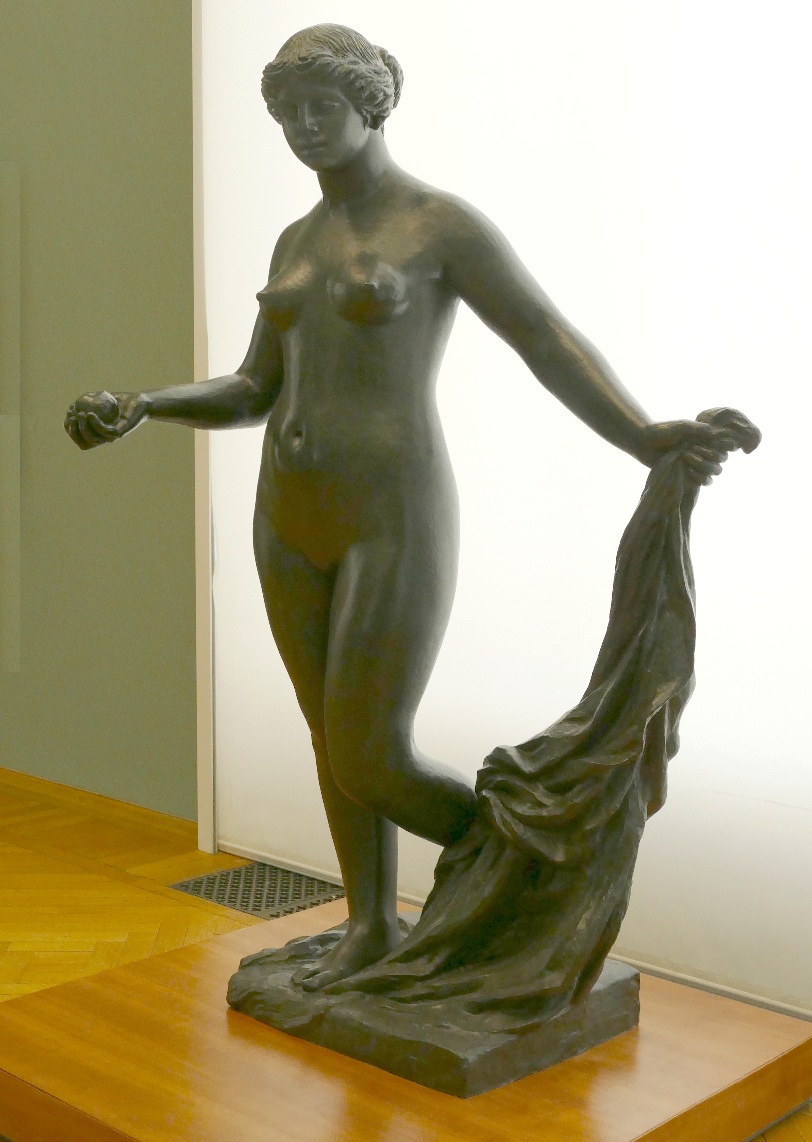 Venus Victrix, statue en bronze grandeur nature par Auguste Renoir, 1913-1915. Collections du musée du Petit-Palais, Paris. Don Ambroise Vollard 1931, N°inv : PPS1708.